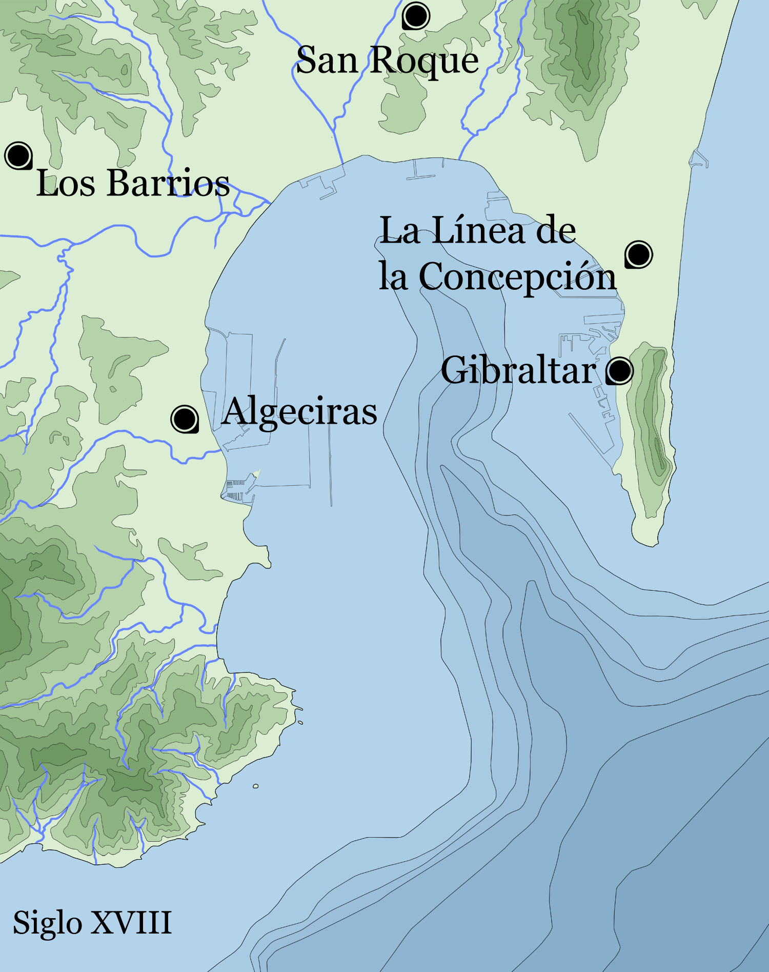 Mapa indicativo de las poblaciones del siglo XVIII de la bahía de Algeciras, Andalucía, España.